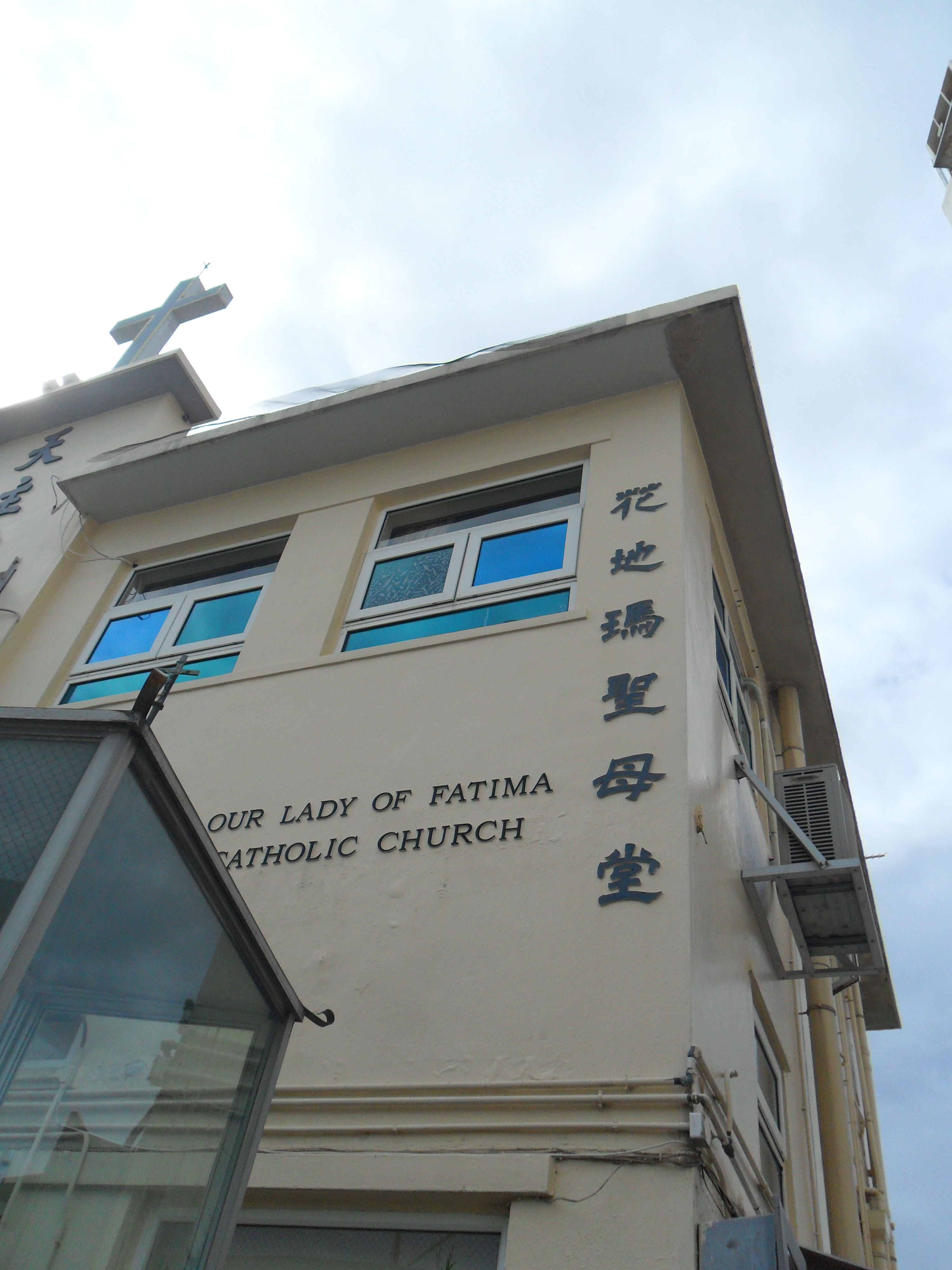 中文（香港）: 長洲花地瑪聖母堂外貌, 香港, 中國